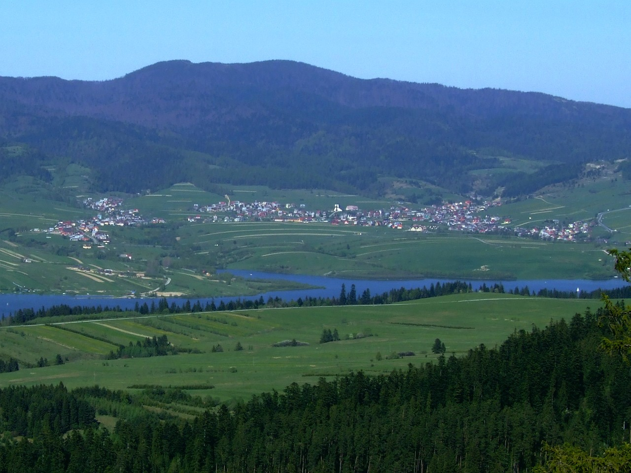 Kluszkowce nad Jeziorem Czorsztyńskim. Widok z Żaru